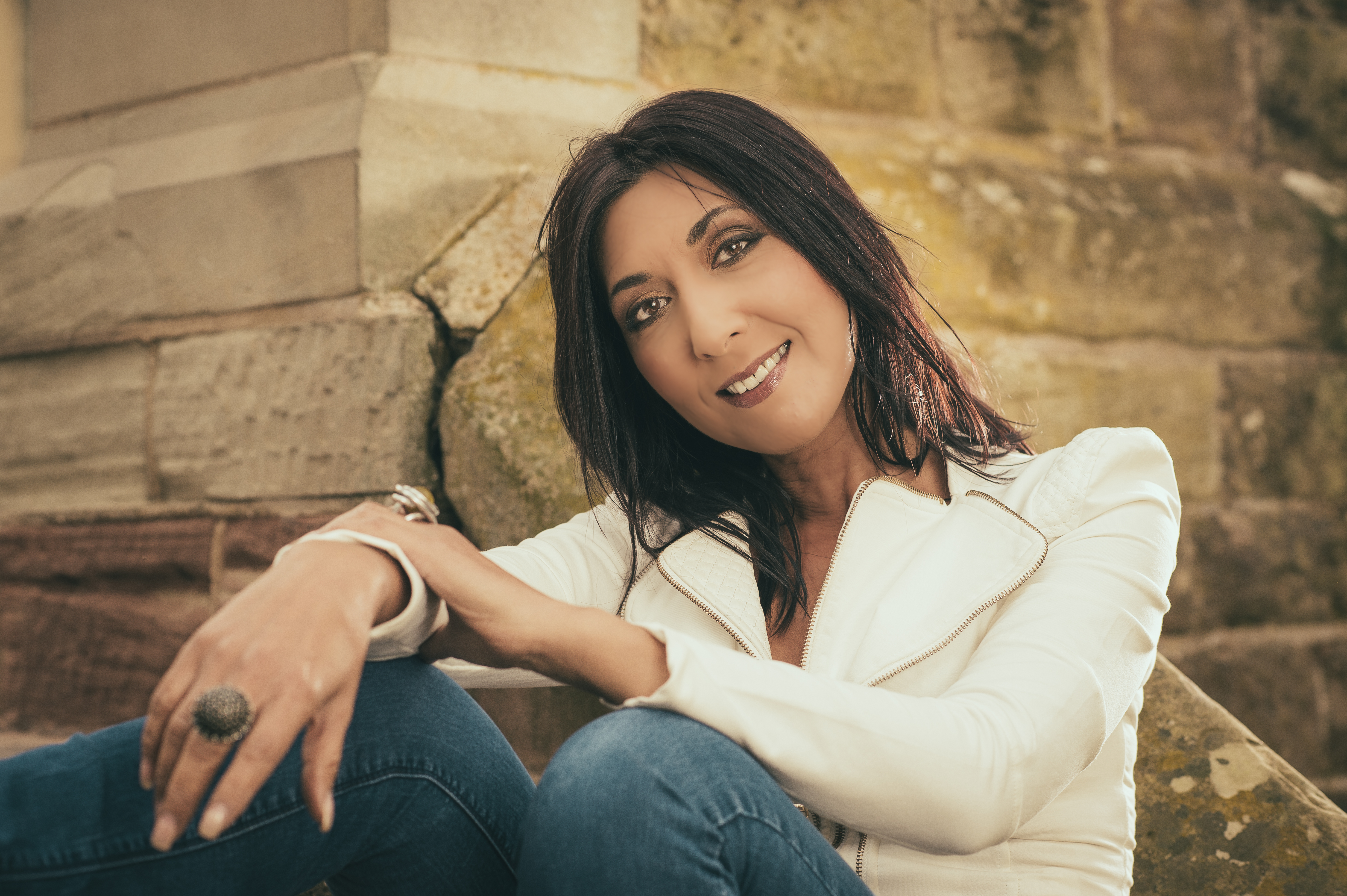 Susan Ebrahimi, 2014